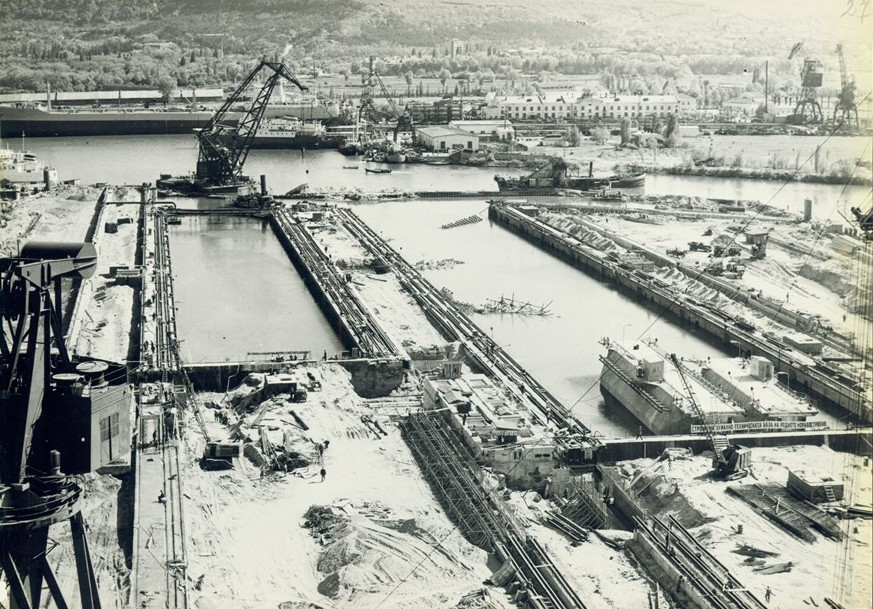 Етап от реконструкцията на корабостроителен завод "Георги Димитров" – Варна, общ изглед от изграждането на голямата и малката докови камери.